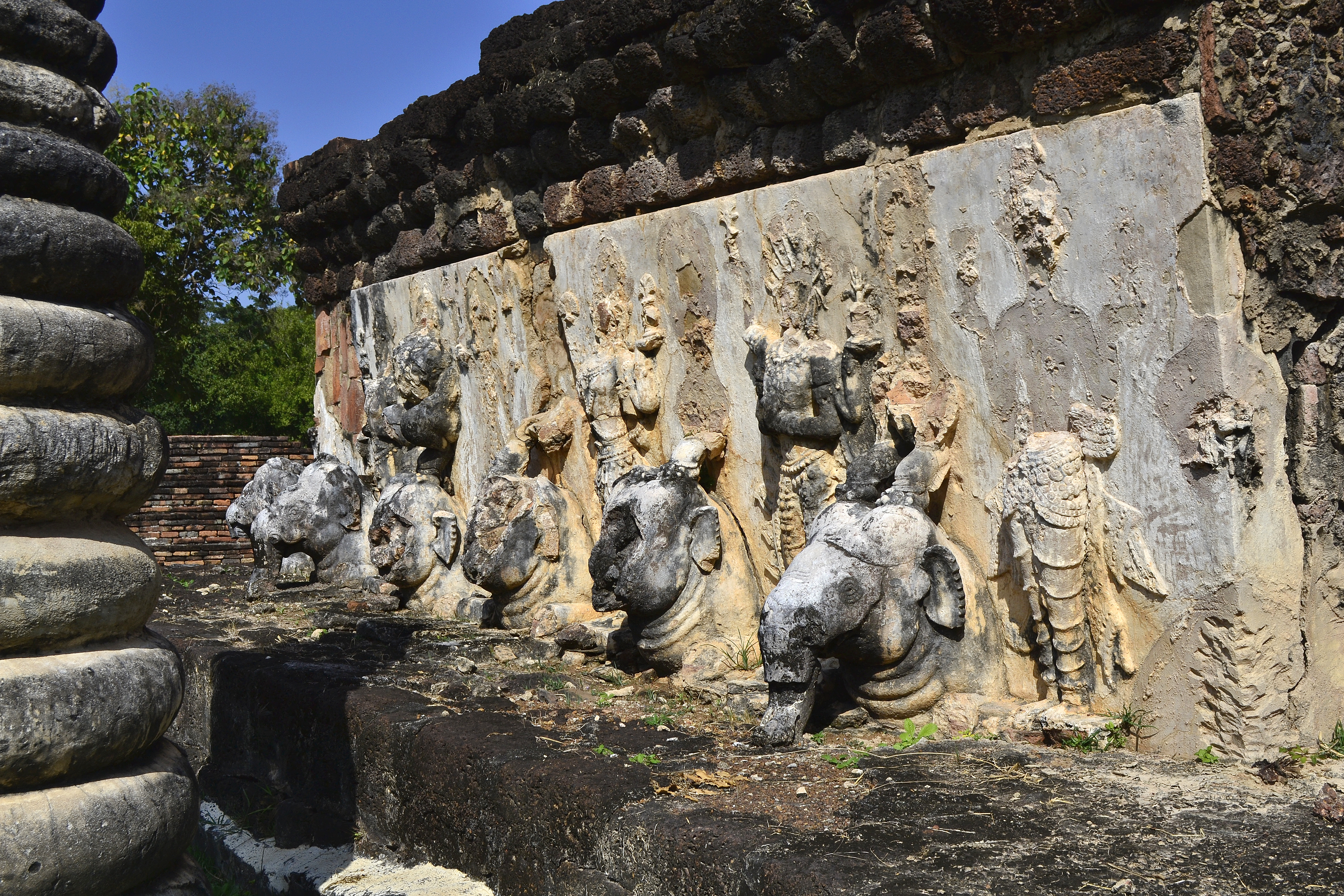 Wat Chedi Si Hong im Geschichtspark Sukhothai